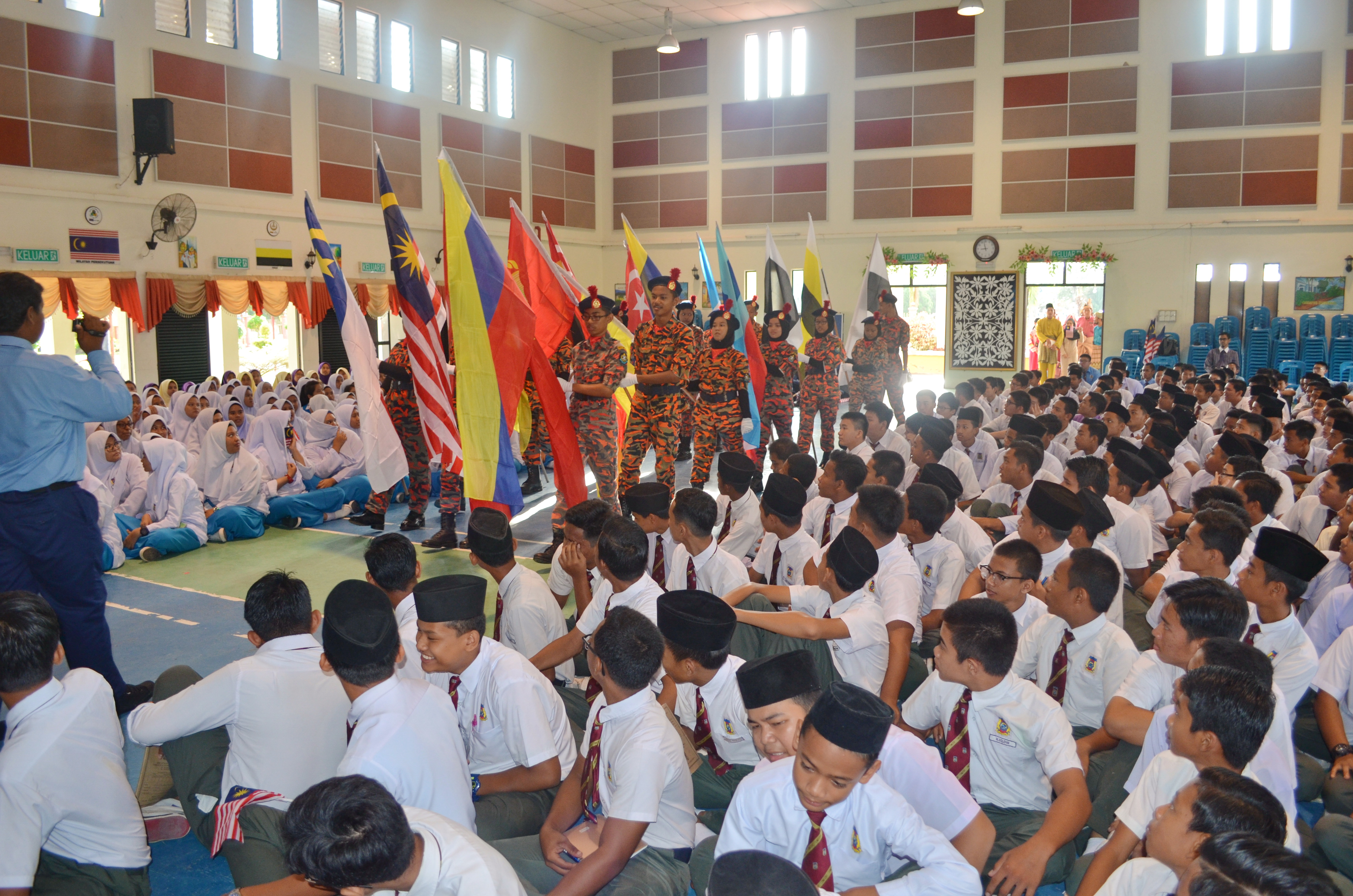 pasukan kadet berarak masuk ke dewan